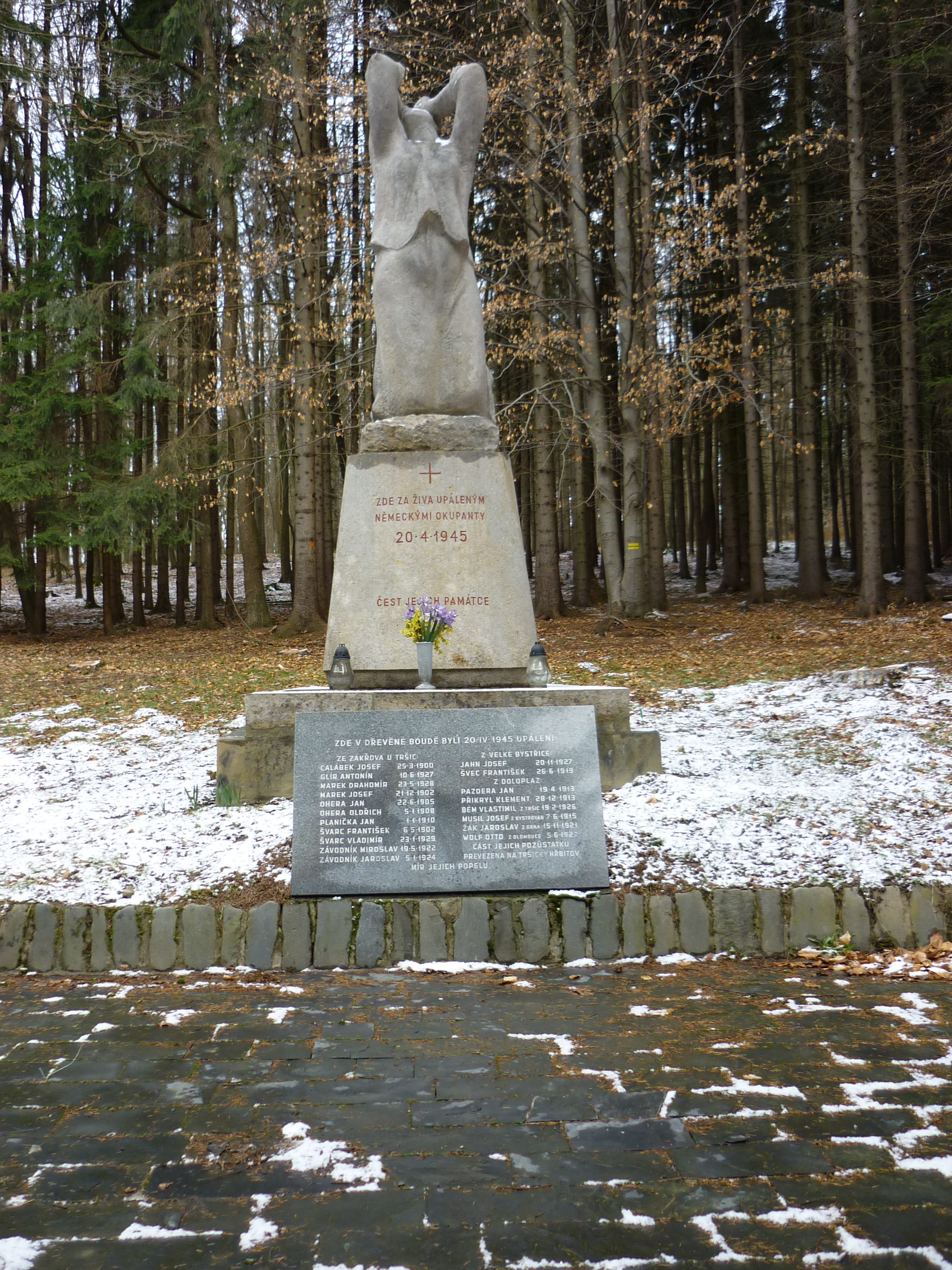 památník nedaleko Kyjanice